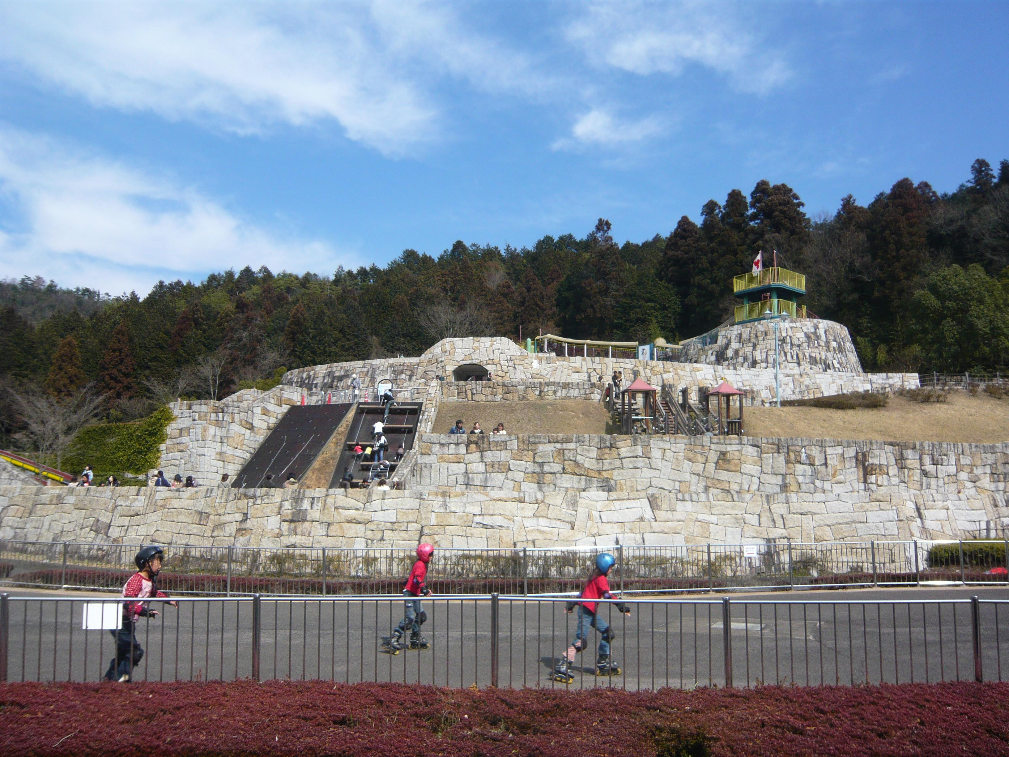 Gifu Family Park こどもゾーン アスレチック（岐阜ファミリーパーク）,Gifu,Gifu,Japan（岐阜県岐阜市）で撮影。